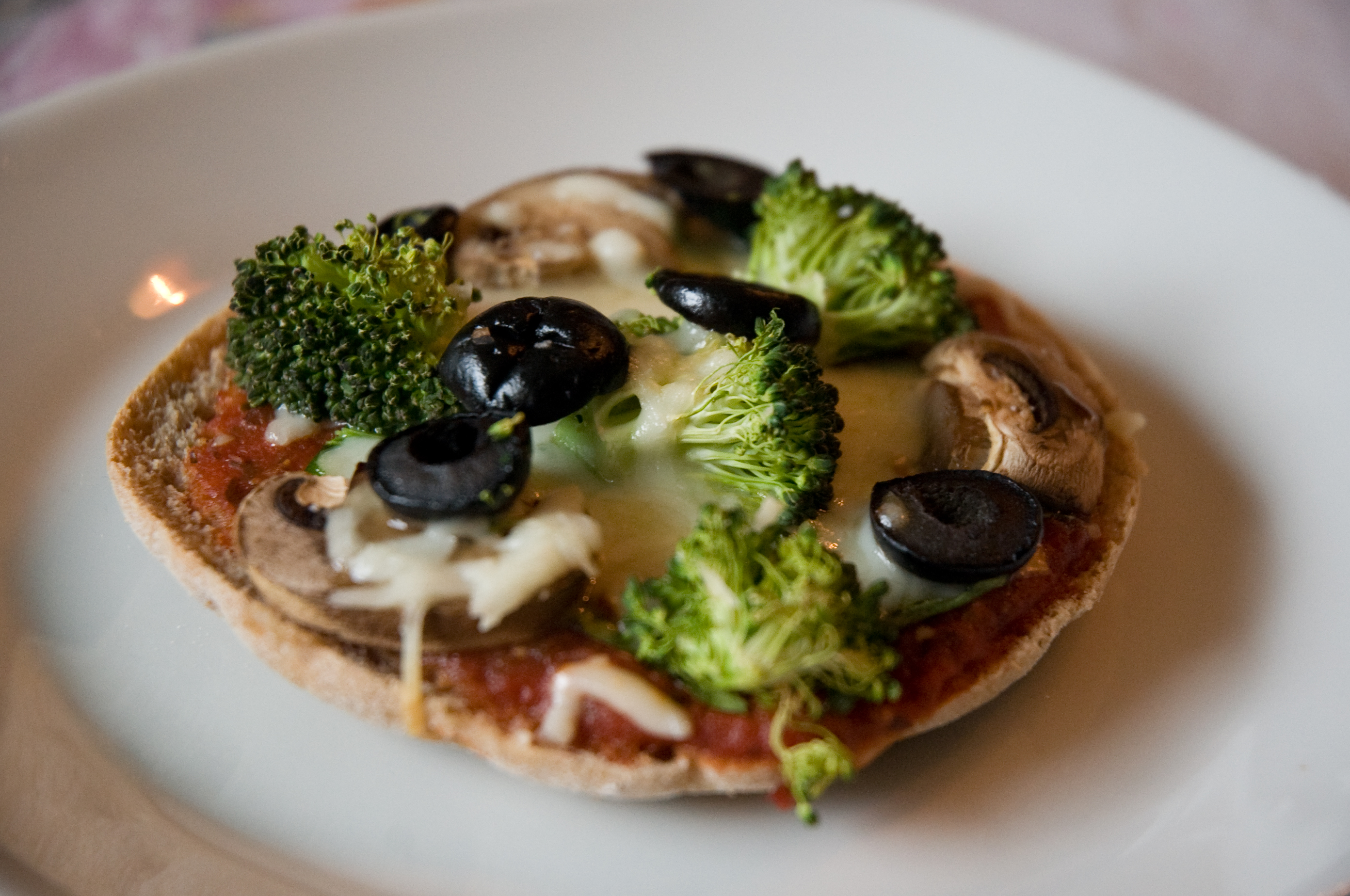 Vegetarian mini pizza